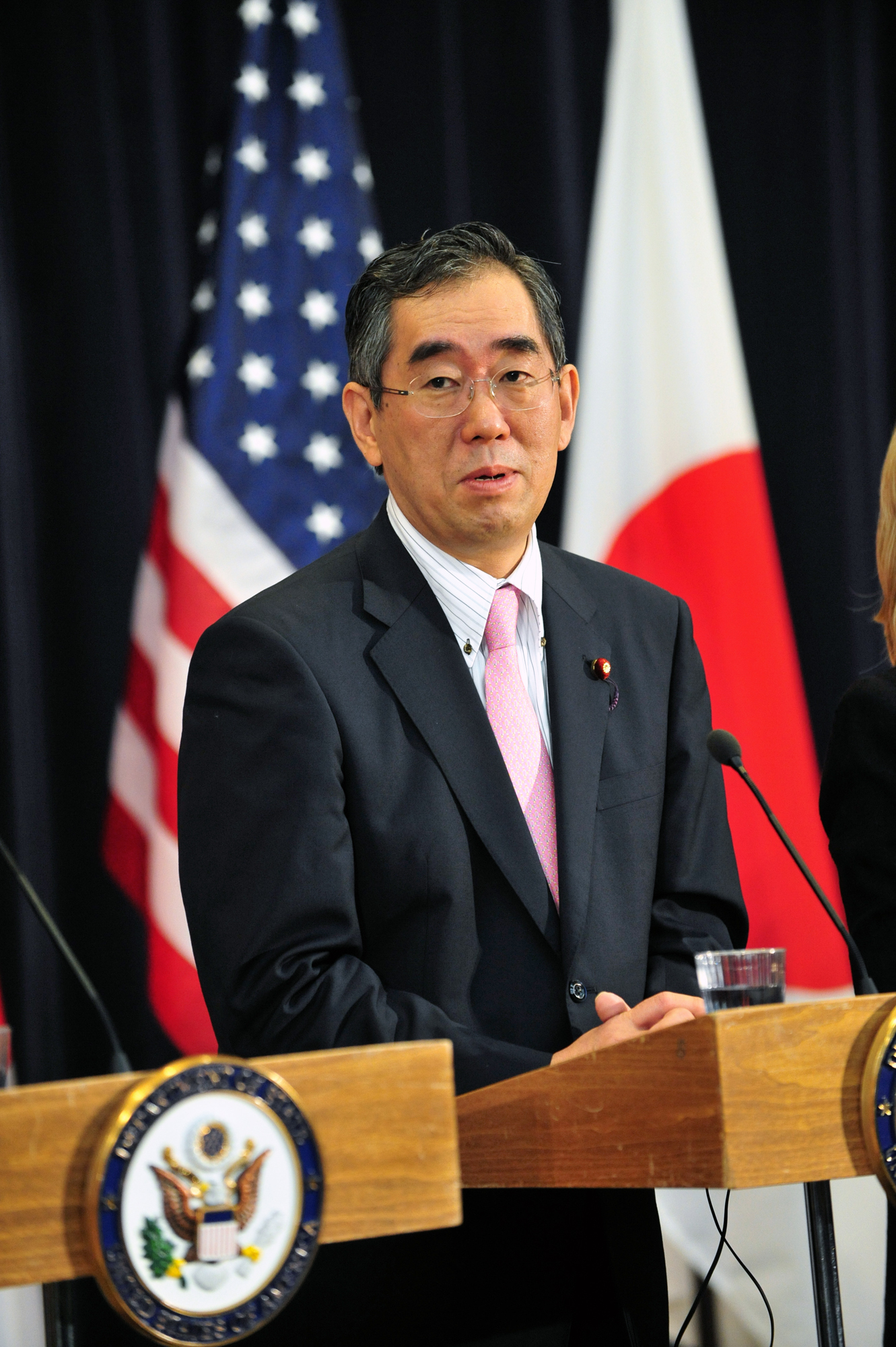 松本剛明外務大臣。